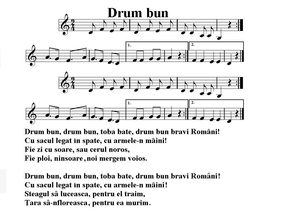 Drum bun, marş militar român